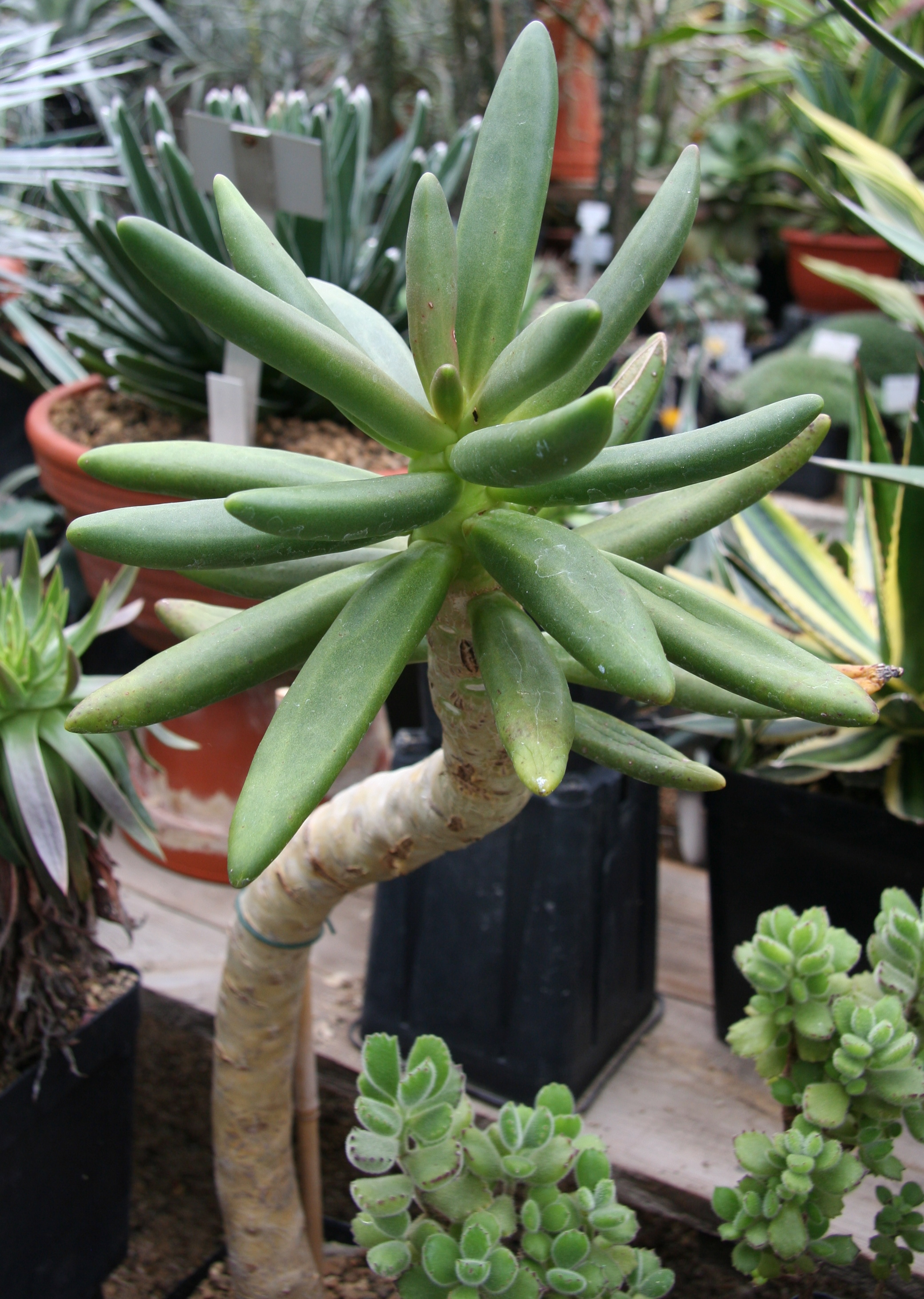 Pachyphytum viride im Botanischen Garten Bochum